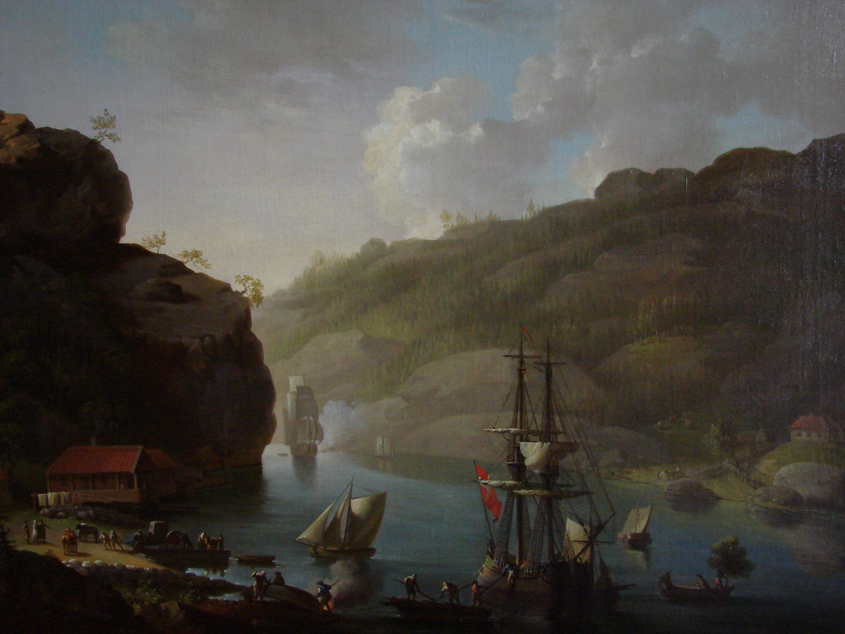 detail